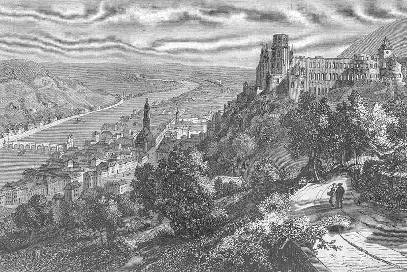 Heidelbergs slottsruiner. Ur "Illustrerad verldshistoria, del 5", utgiven i Stockholm 1878, sidan 60. Bilden inscannades (delvis beskuren) den 24 augusti 2004, av Harri Blomberg.